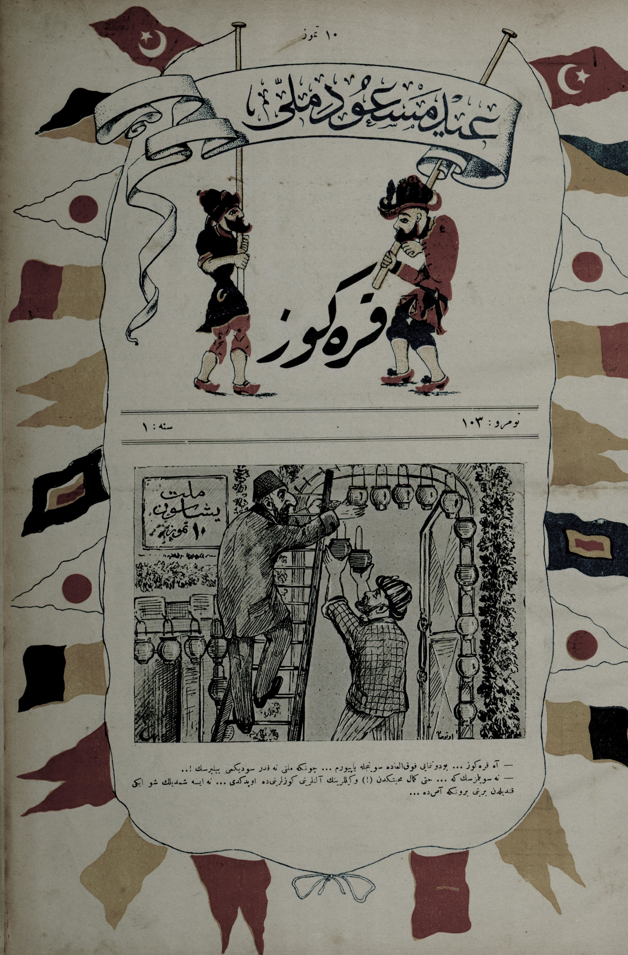 Haftalık gazete